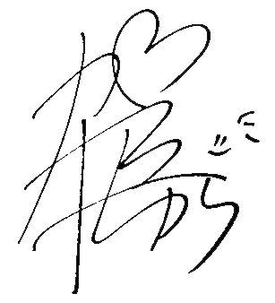 架乃ゆら署名